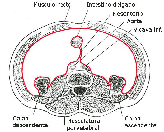 Sección del abdomen humano en la que es visible el peritoneo en rojo y el mesenterio.